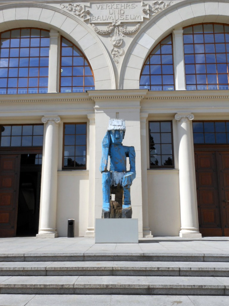 Volk Ding Zero (« Peuple Chose Zéro »), une sculpture réalisée par Georg Baselitz en 2009, à l'entrée du musée d'Art contemporain de Berlin (Museum für Gegenwart, Hamburger Bahnhof).